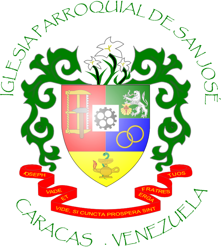 Escudo de la Iglesia Parroquial de San José de Caracas (Completo)